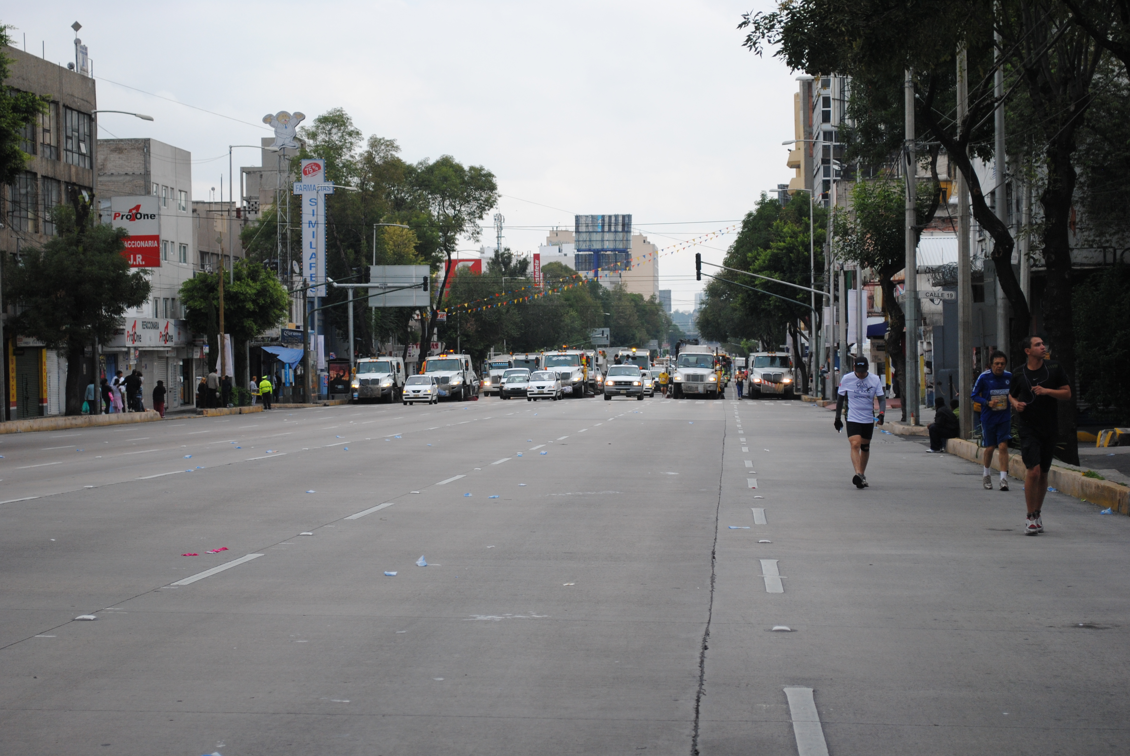 Avenida Revolución de la Ciudad de México, cerrada por el paso del Maratón Internacional de la Ciudad de México.